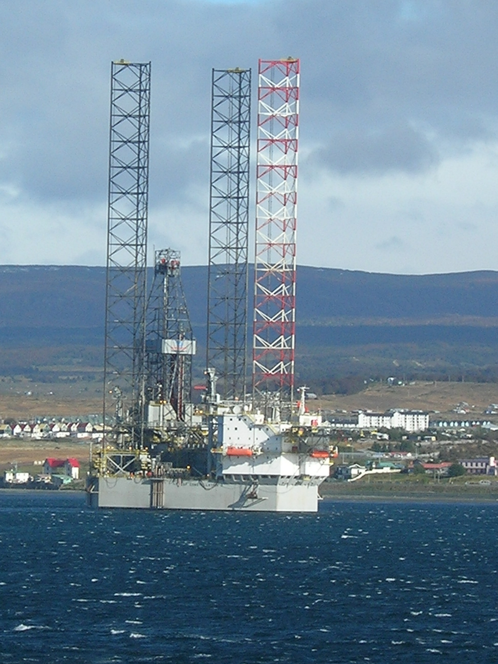 Plate-forme pétrolère GSF Constellation II au large de Punta Arenas (Chili )